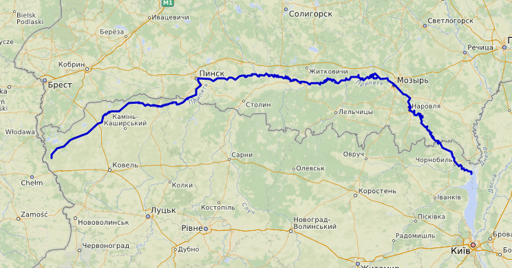 carte réalisée sur umap This map may be incomplete, and may contain errors. Don't rely solely on it for navigation.